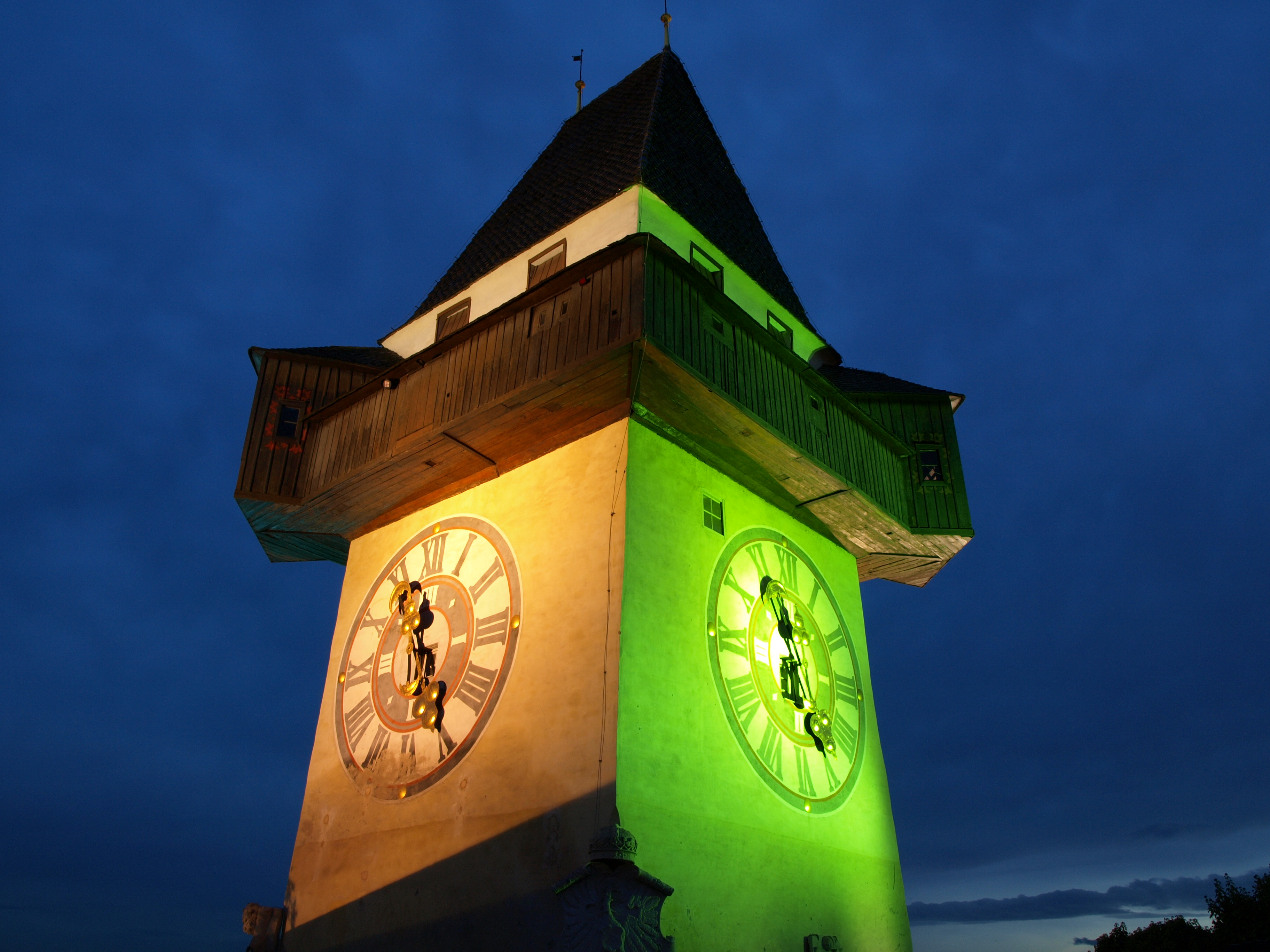 Grazer Uhrturm bei Nacht / Graz Clocktower at night